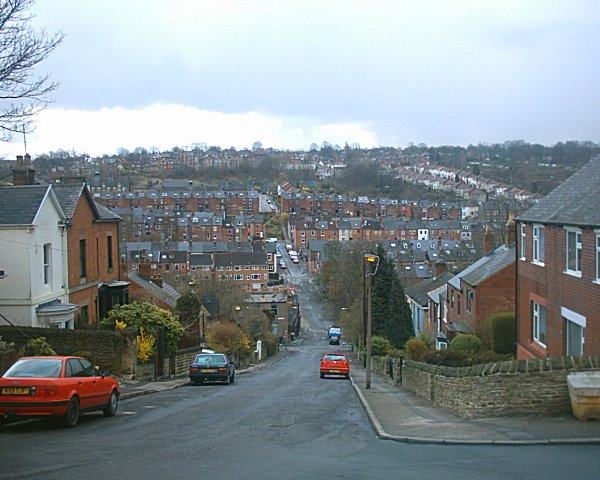 Kent Road, Heeley.